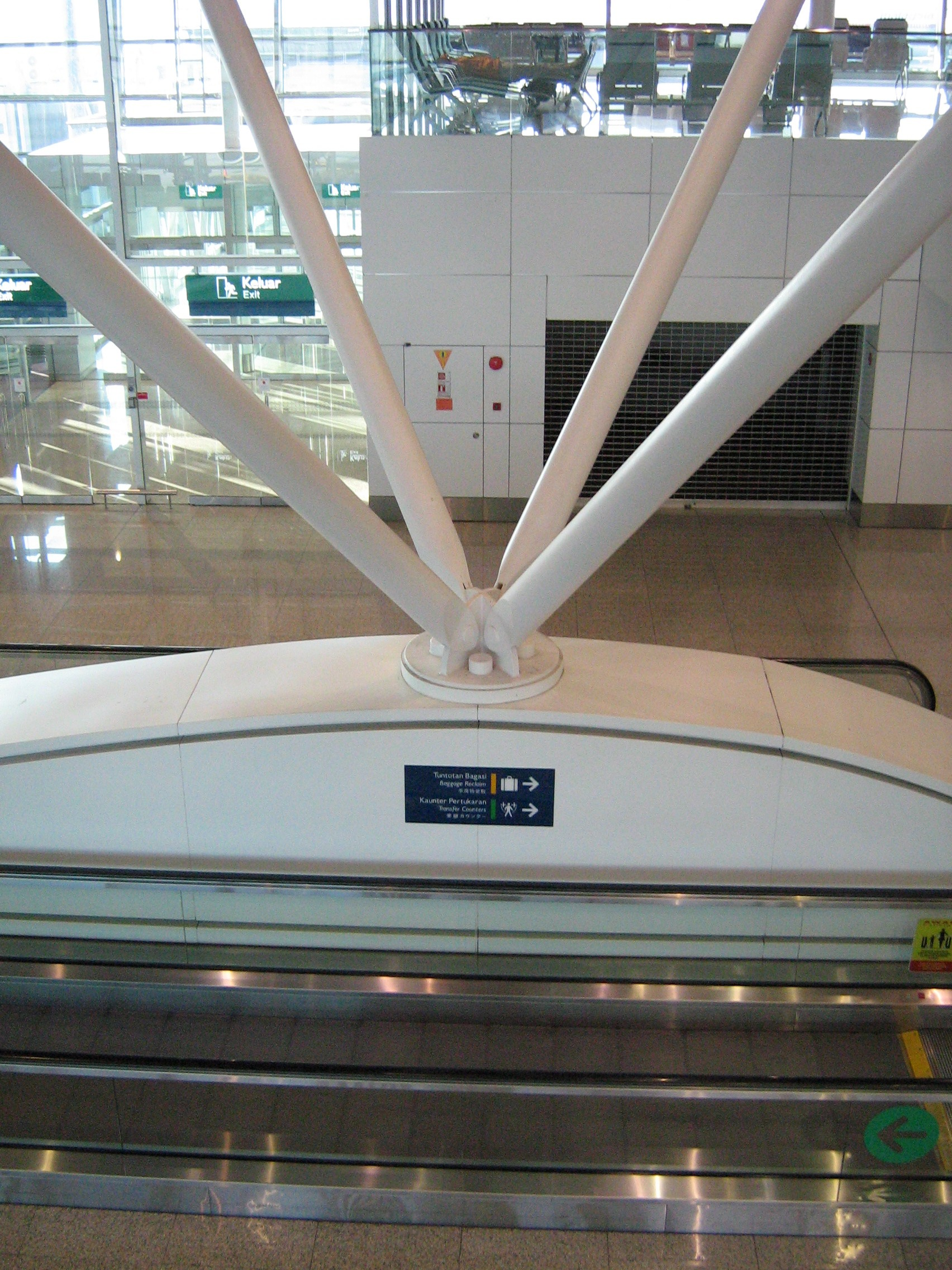 Viergeteilte Stahlstütze im Satellite.